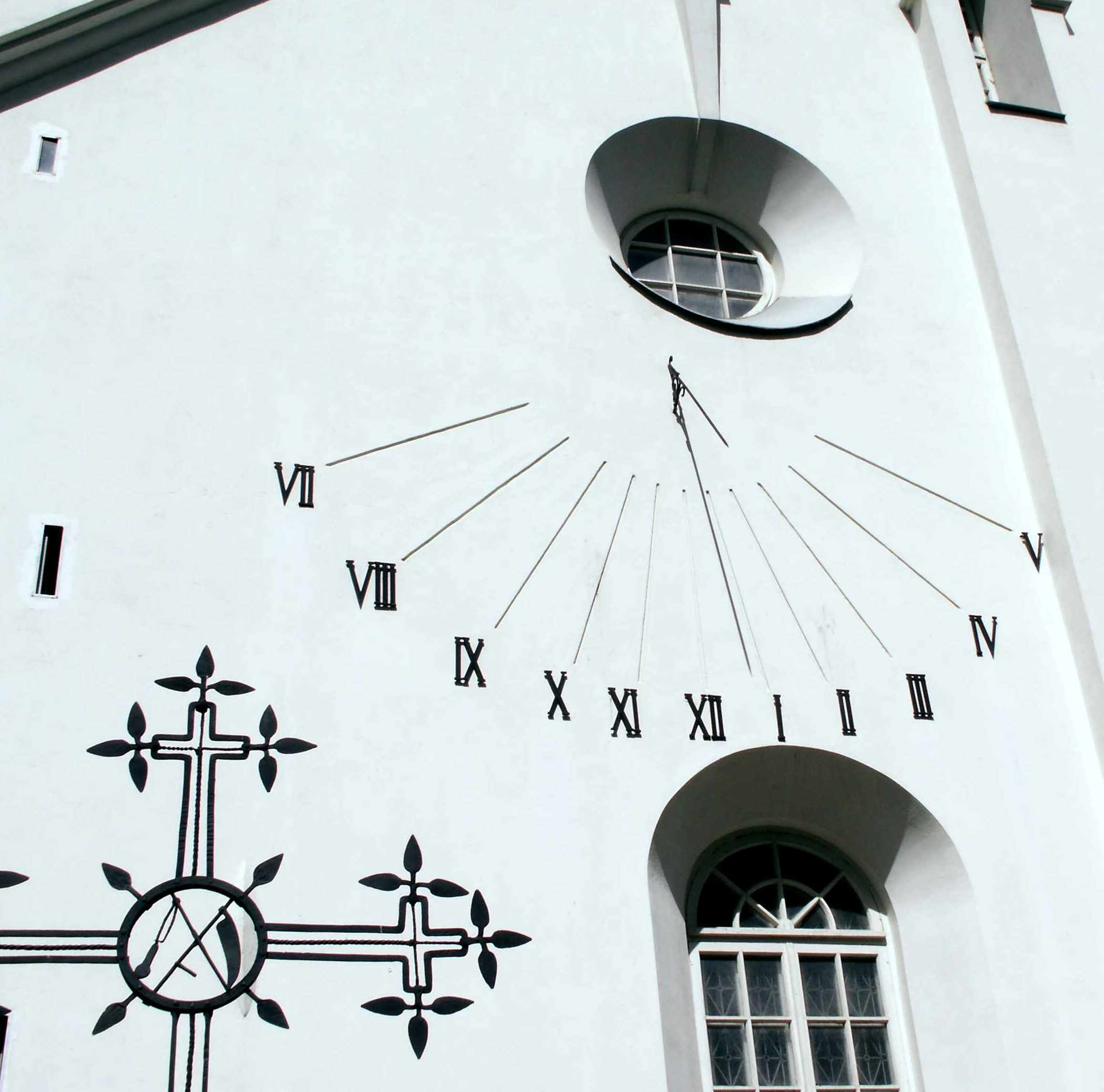 Saulės laikrodis ant Šiaulių Šv. Petro ir Povilo katedros sienos